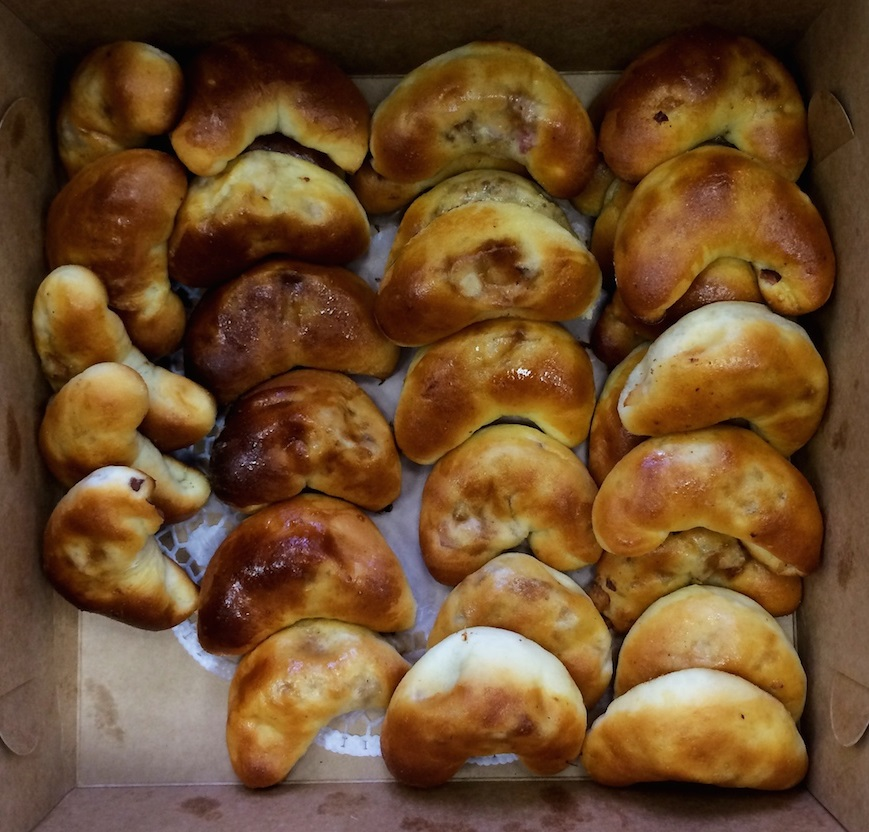 Līgo pīrādziņi.